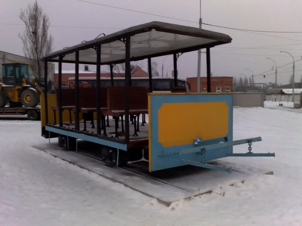 Пам'ятник кінному трамваю: Фотографія пам'ятнику кінному трамваю